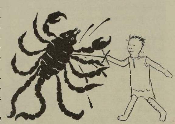 Ilustração do livro A Menina do Narizinho Arrebitado.